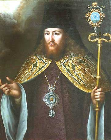 портрет архимандрита Троице-Сергиевой лавры Гедеона Криновского, созданного в мастерской ТСЛ между 1770-1775 гг.